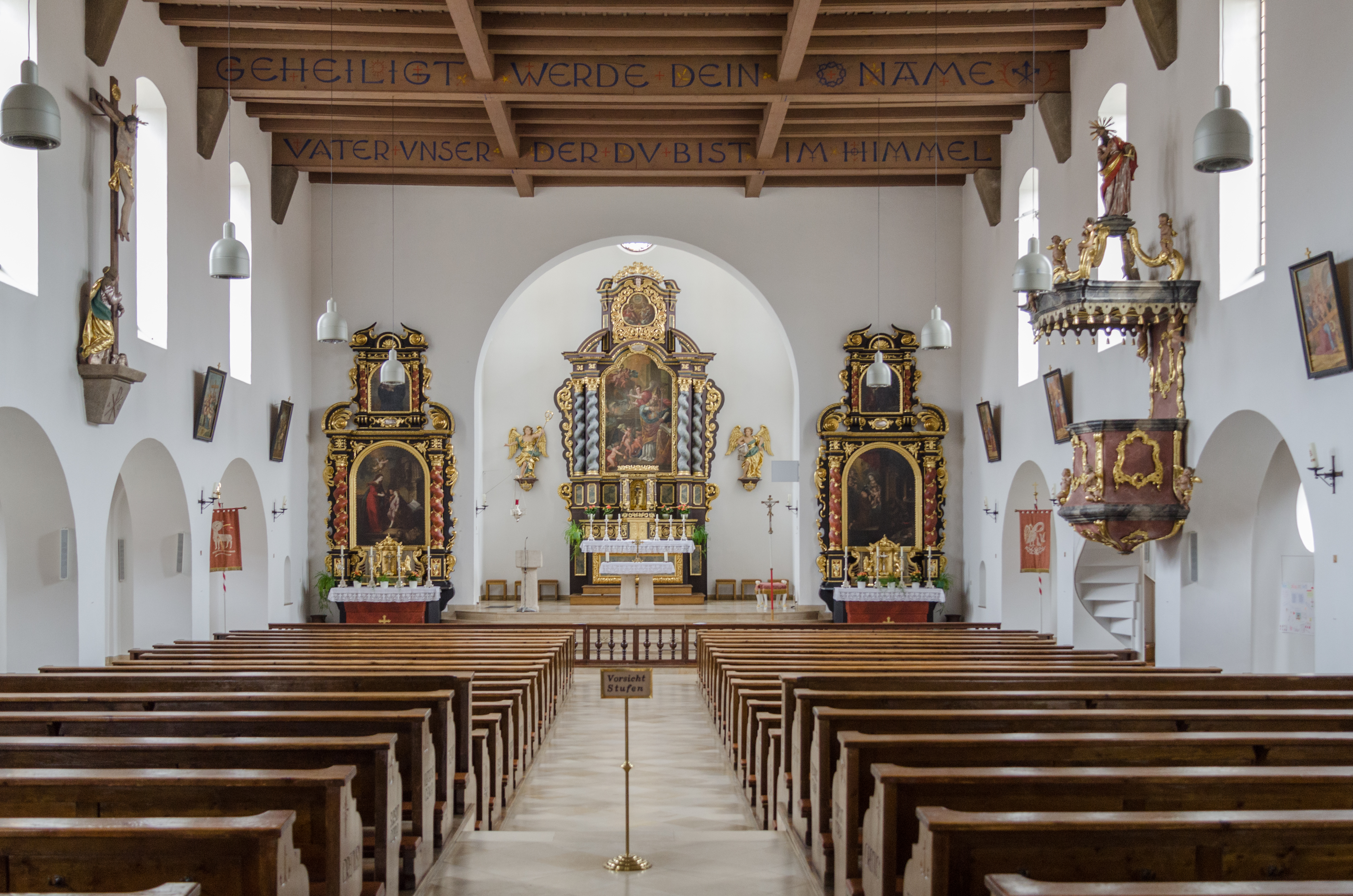 Pleinfeld, Kath. Pfarrkirche St. Nikolaus